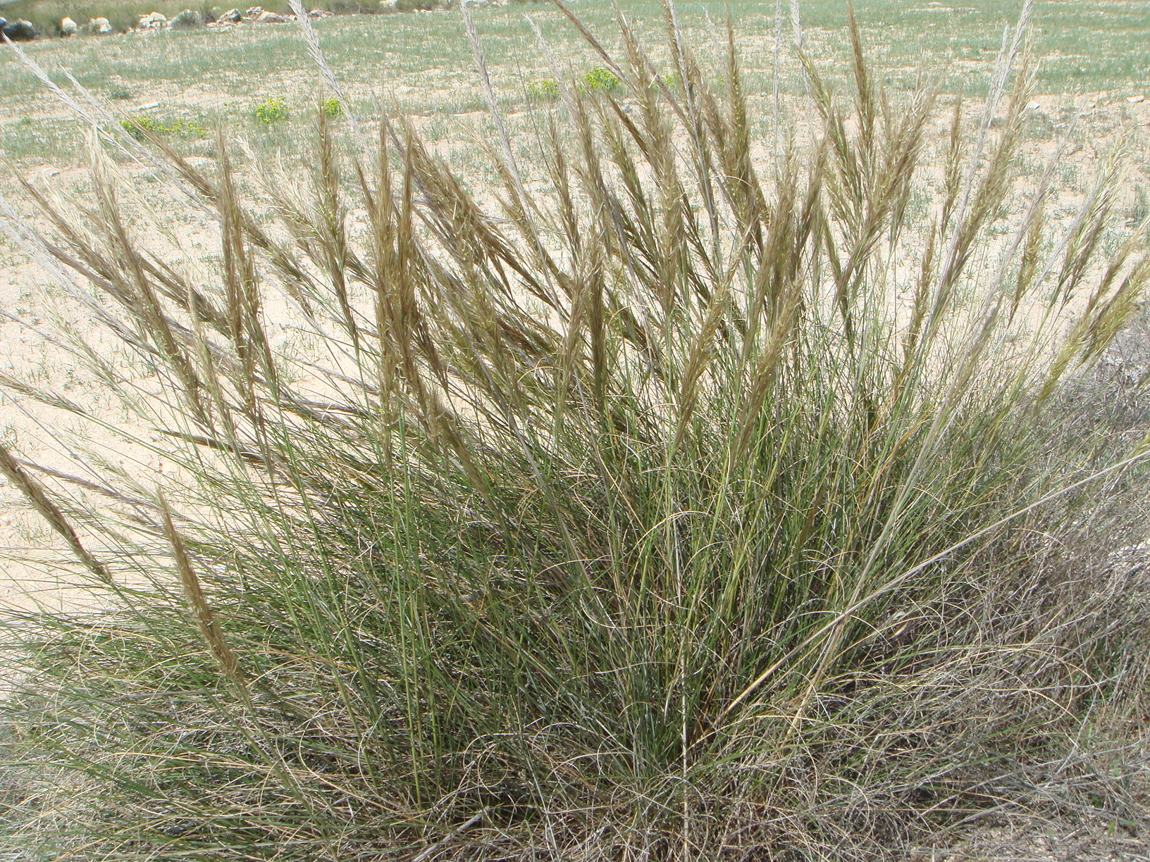 Stipa tenacissima, Hoya de Guadix, Granada, España